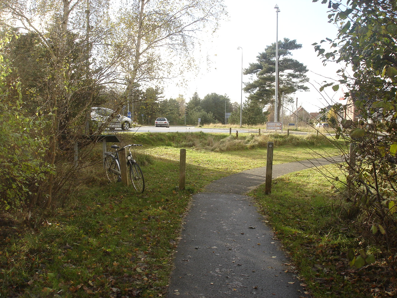 Natursti "Gjernbanen" slutter ved Smingevej i Resenbro